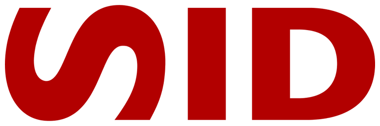 Logo of the defunct Specialarbejderforbundet i Danmark (SiD).